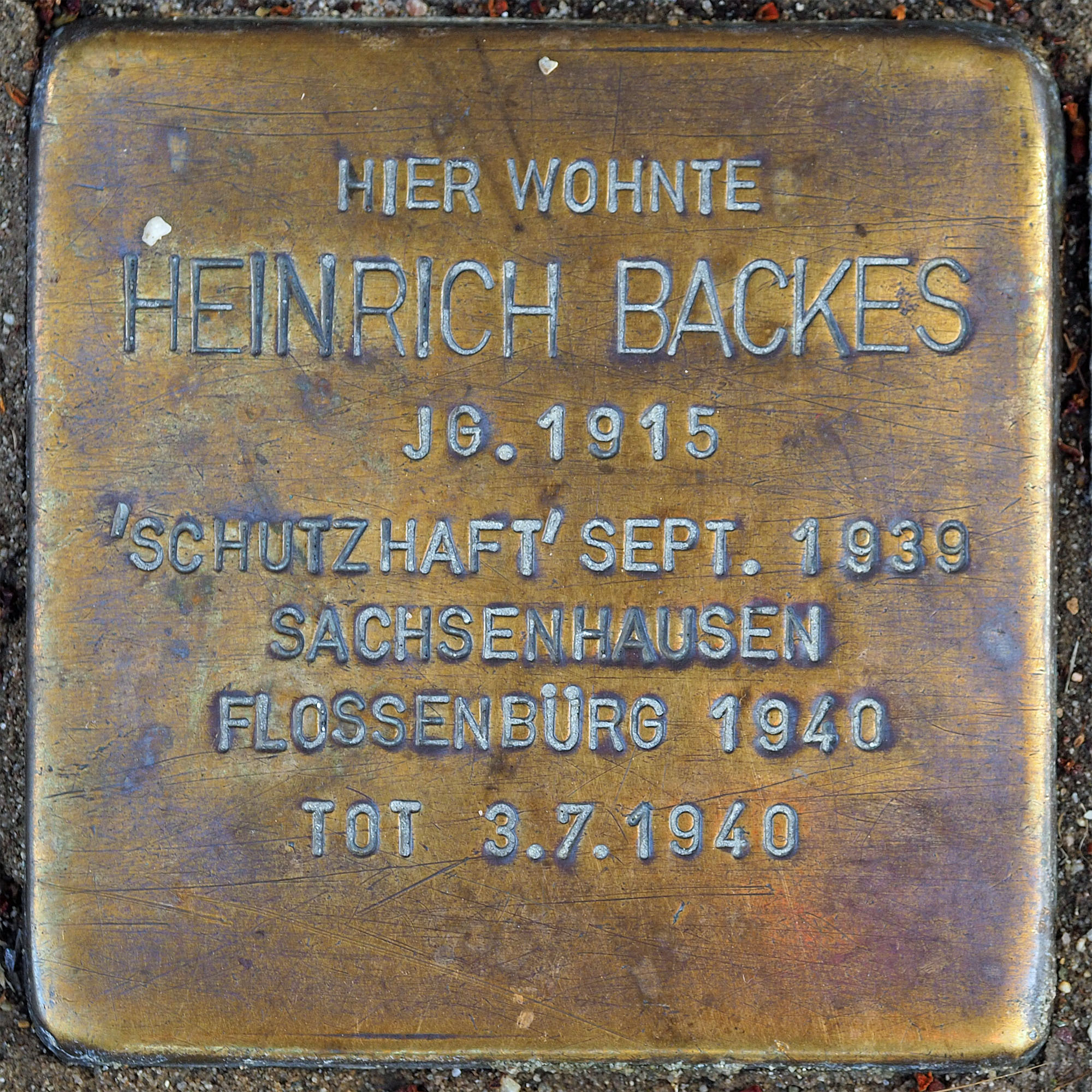 Stolpersteine MG: Backes, Heinrich